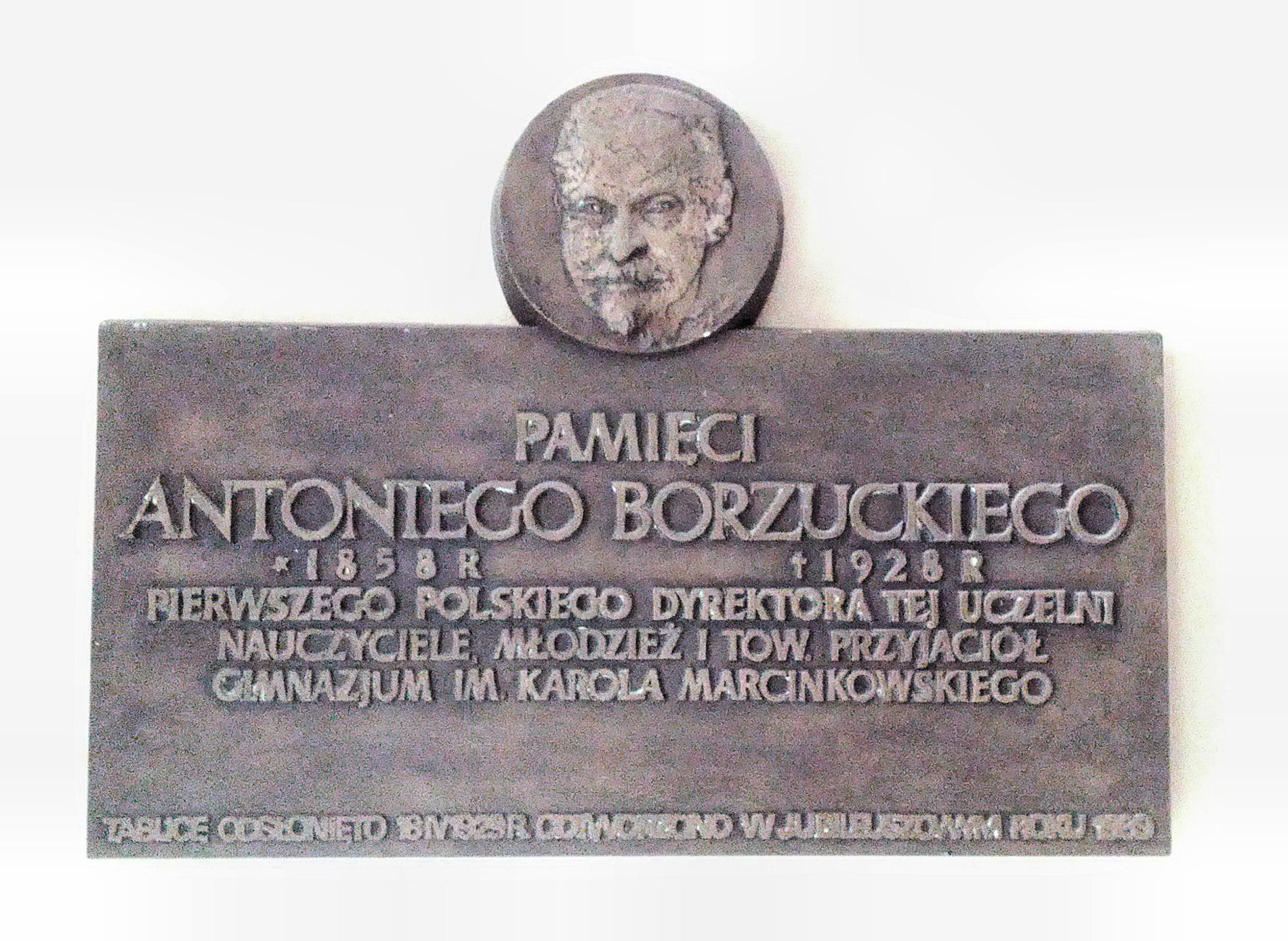 Antoni Borzucki tablica pamiątkowa, I Liceum Ogólnokształcące im. Karola Marcinkowskiego w Poznaniu, Polska